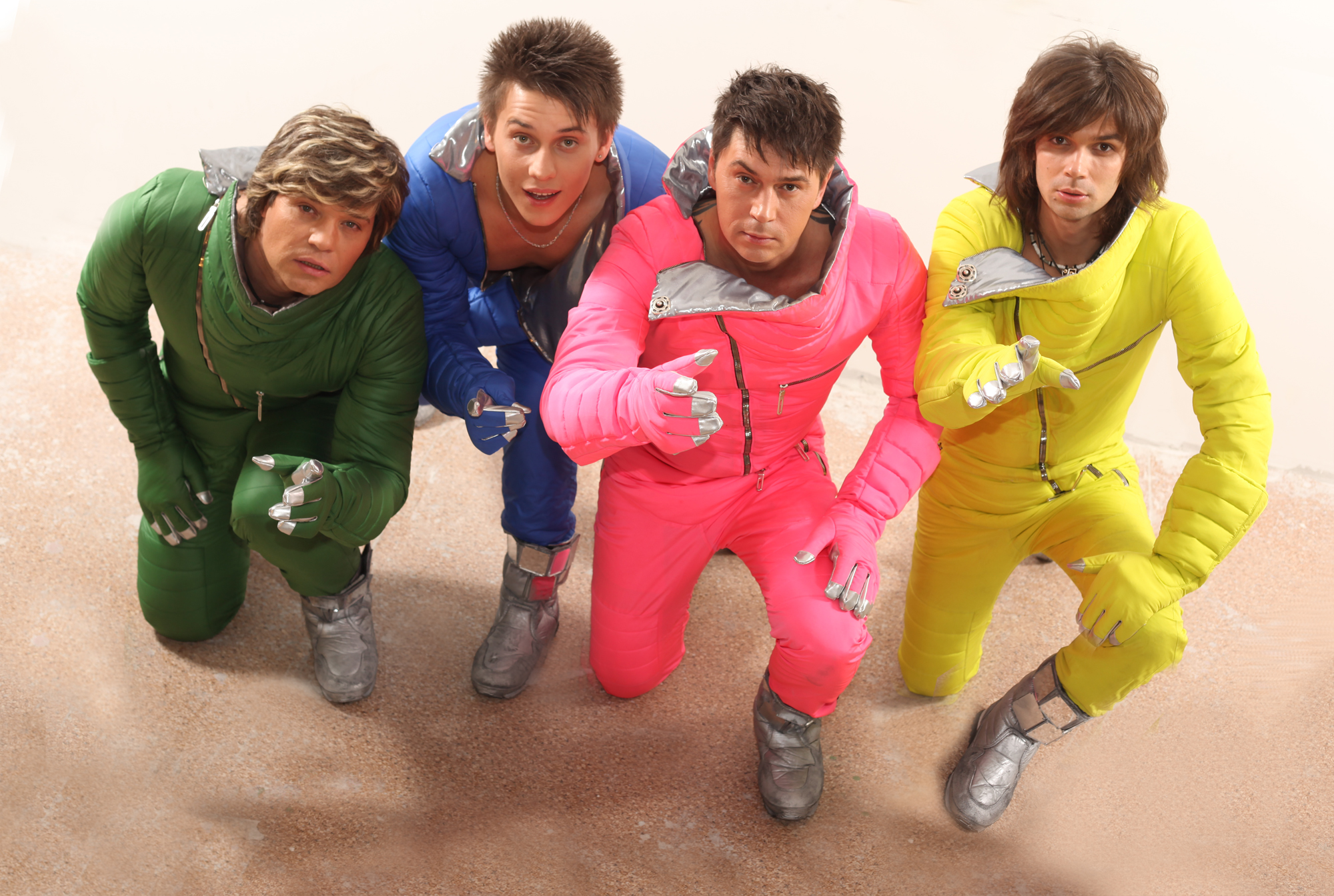 группа На-На на съмках клипа "Дышу я"